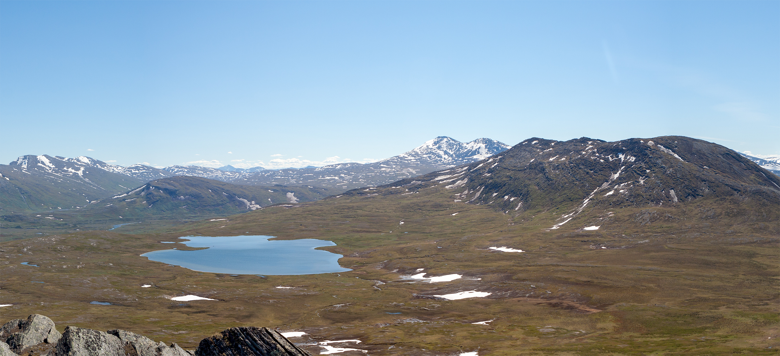 Vy mot Lágojávrre från toppen av Lágotjåhkkå. Till höger Gáhpesoajvve närmast och Jiegŋáffo.